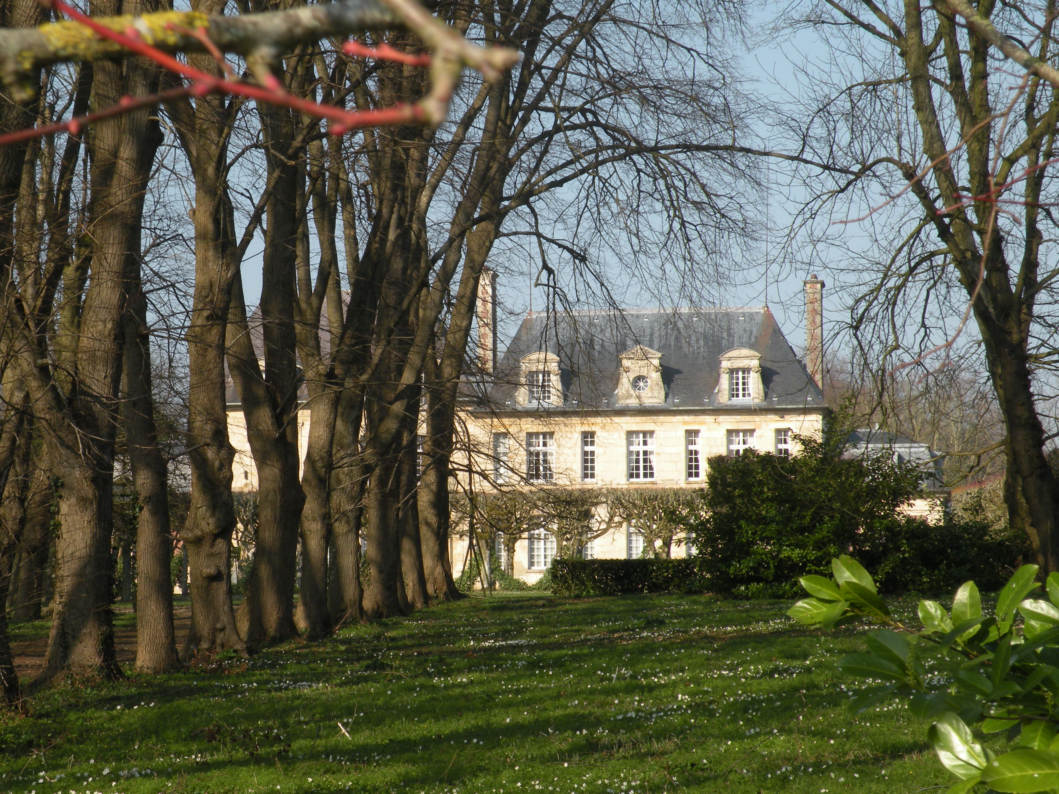 Château de Corbeil-Cerf